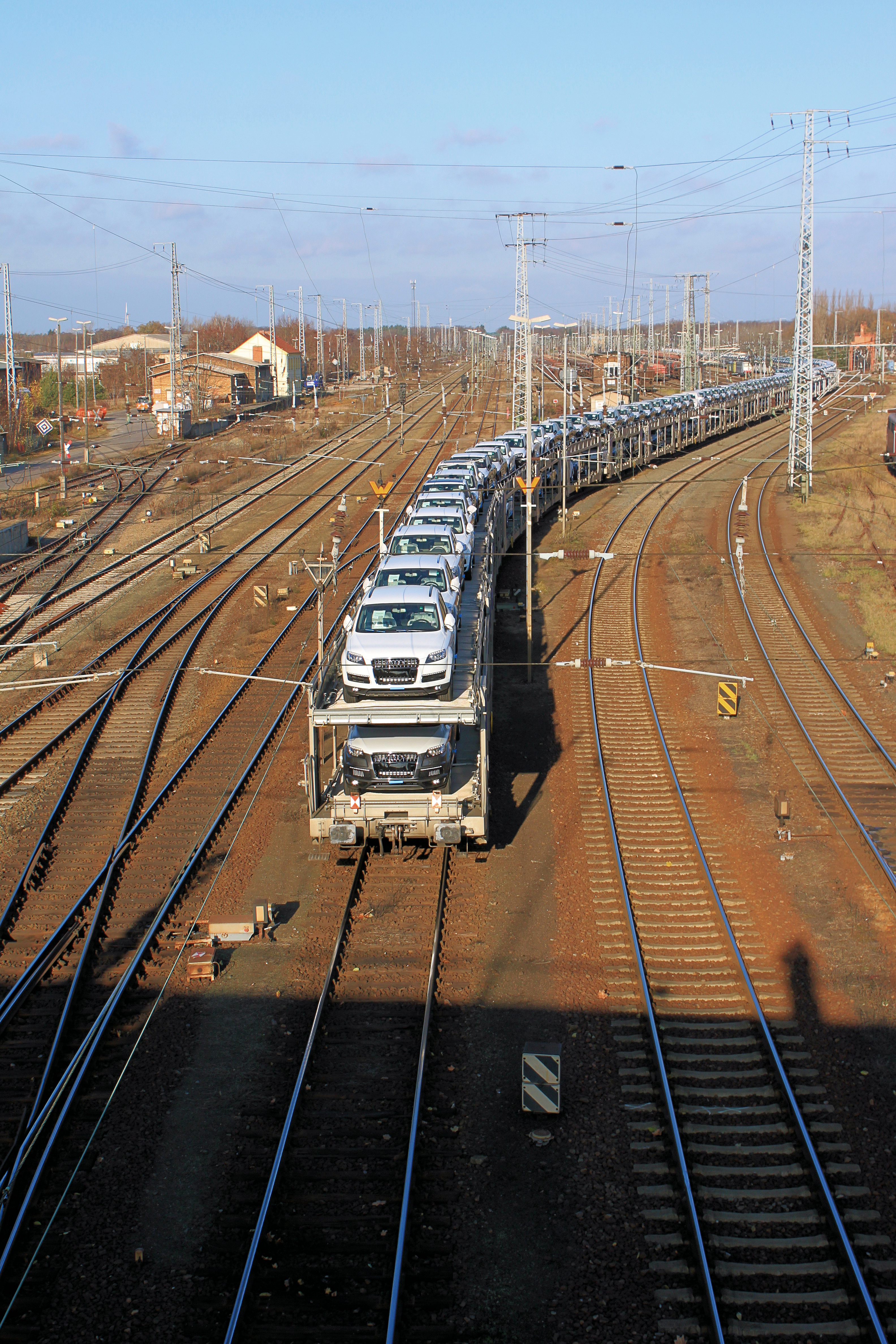 Autotransportzug mit Audi-PKW im unteren Bahnhof Falkenberg/Elster. Importfahrzeuge aus VW Werk Bratislava/ Slowakien.